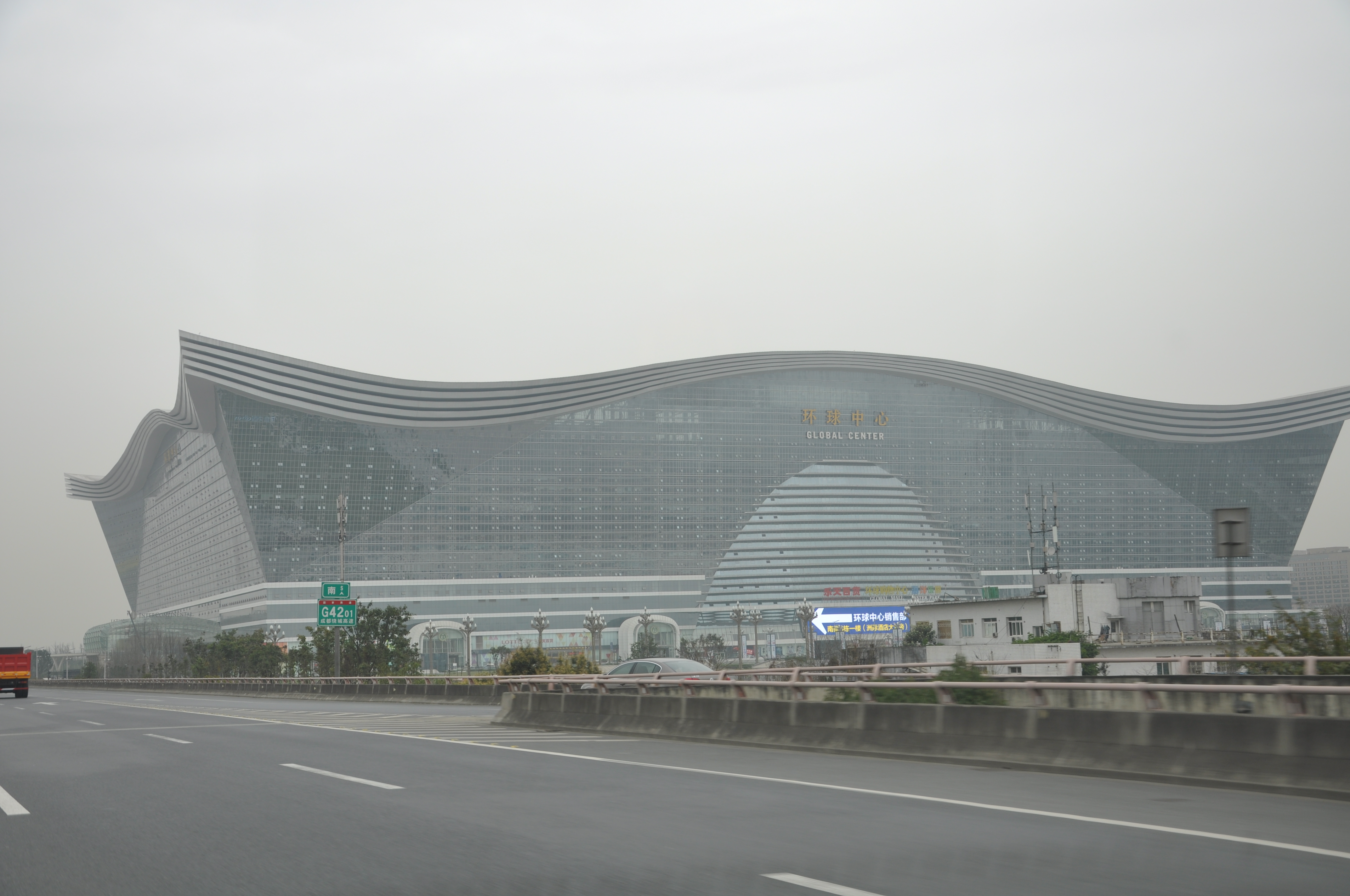 环球中心